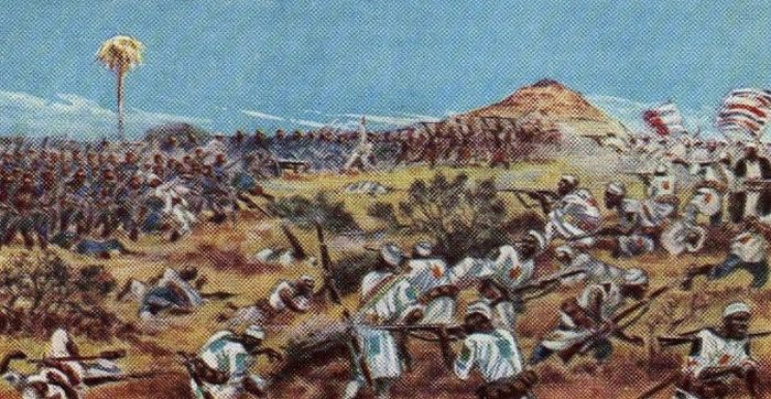 Bataille de Redjaf livrée le 17 février 1897 entre les Mahdistes et l'armée de l'Etat indépendant du Congo